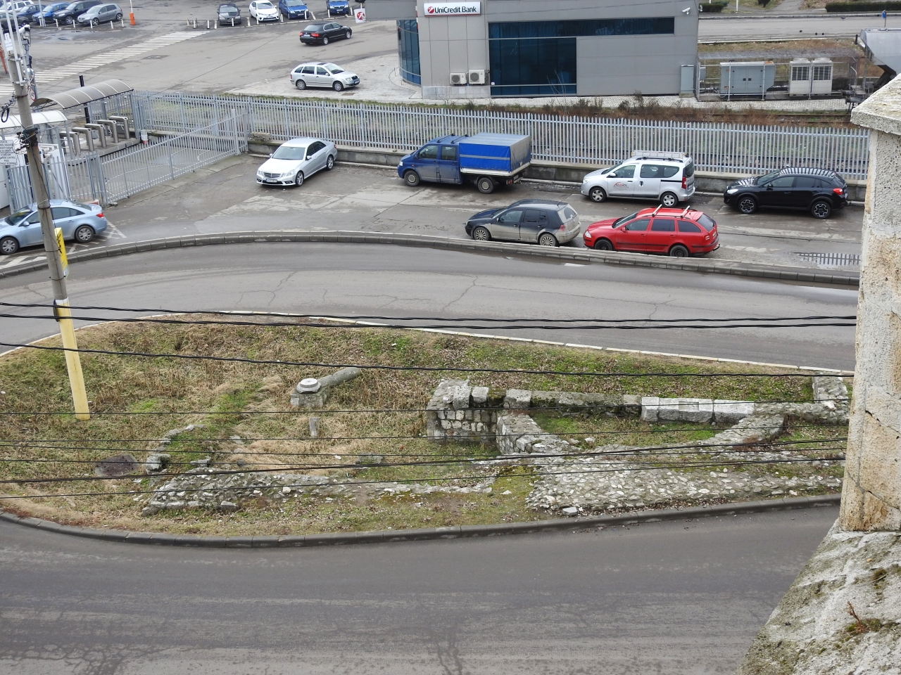 Bazilica creștină 03